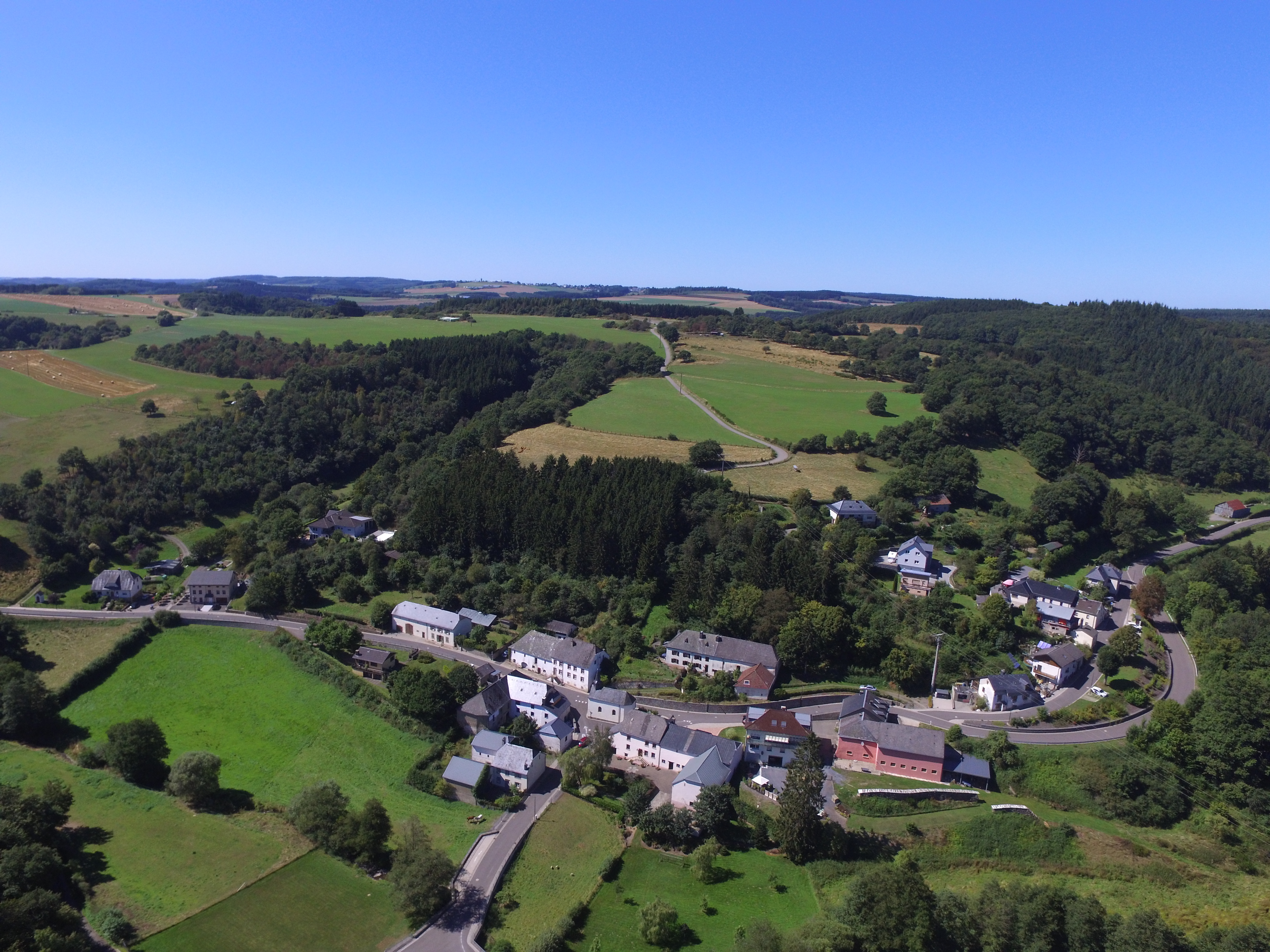 Une photo d'une drone